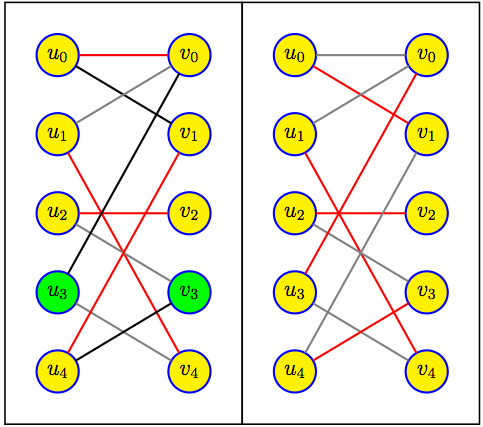 Hopcroft-Karp-exemple-deuxieme-partie